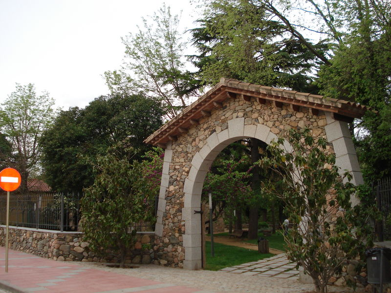 Entrada dels Jardins de la Rectoria Vella de Sant Celoni foto ZztopzZ